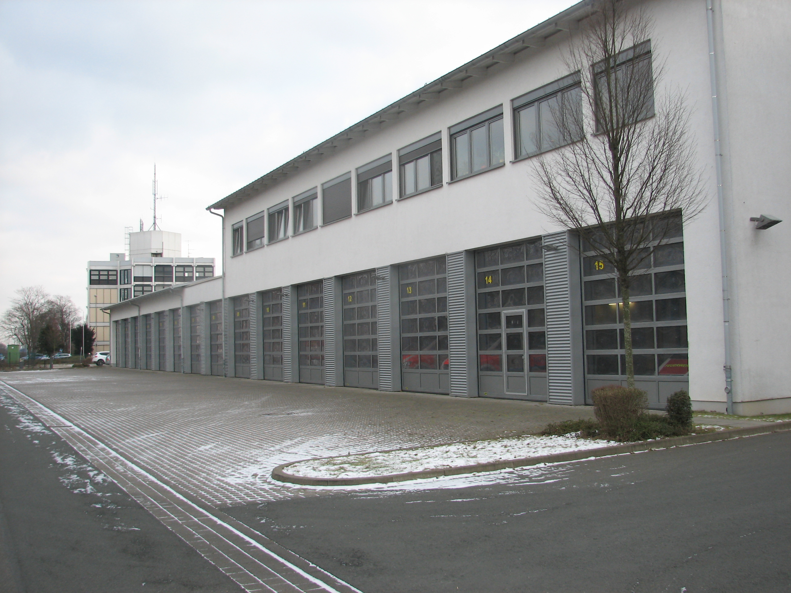 Halle der neuen zentralen Rettungsstelle Minden